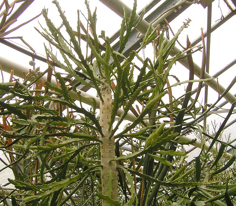 Euphorbia epiphylloides BG Heidelberg, Germany